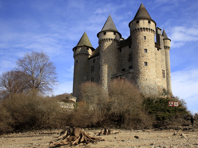 Le Château de Val dans la commune de Lanobre dans le Cantal